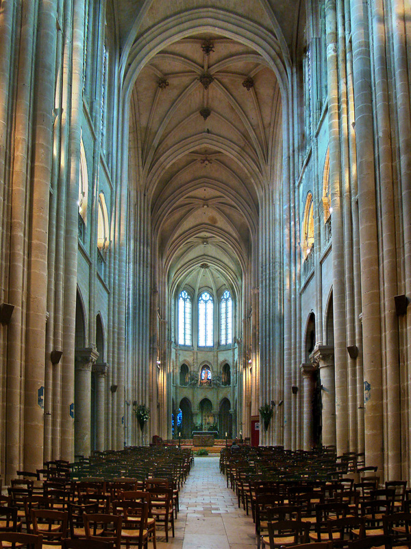 Notre-Dame de Senlis, Oise, Picardie, France.